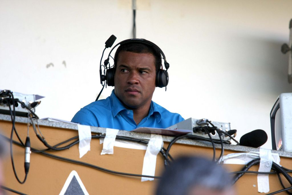 (portuguese) Muller, ex-jogador de futebol, hoje comentarista esportivo (Brasil)